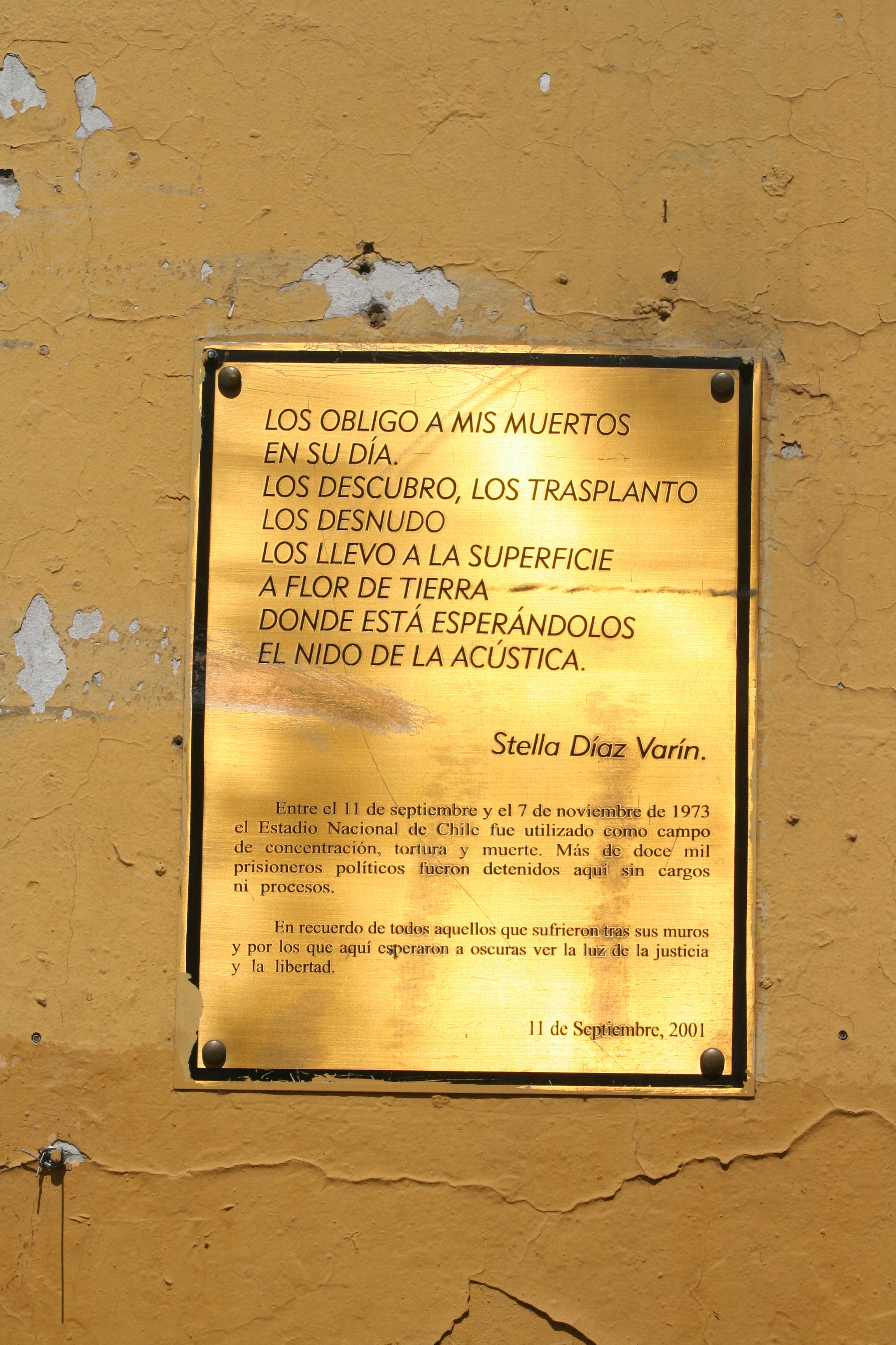 Memorial conmemorativo de la violación de los DDHH en Chile durante el régimen de Pinochet